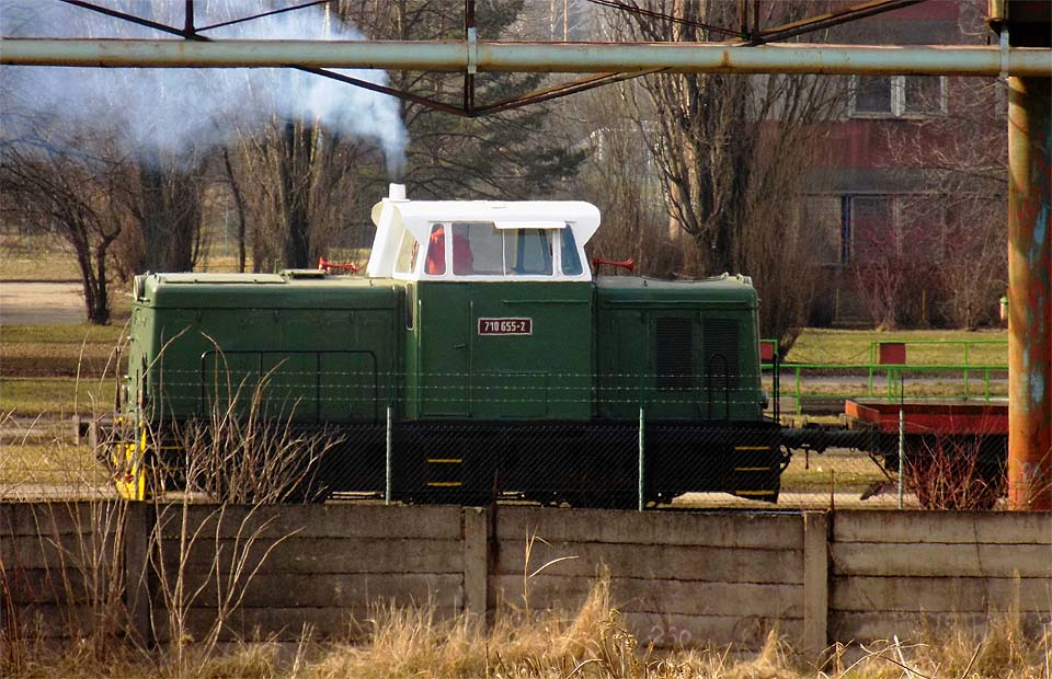 Rosnička 710 655-2 při posunu v areálu.